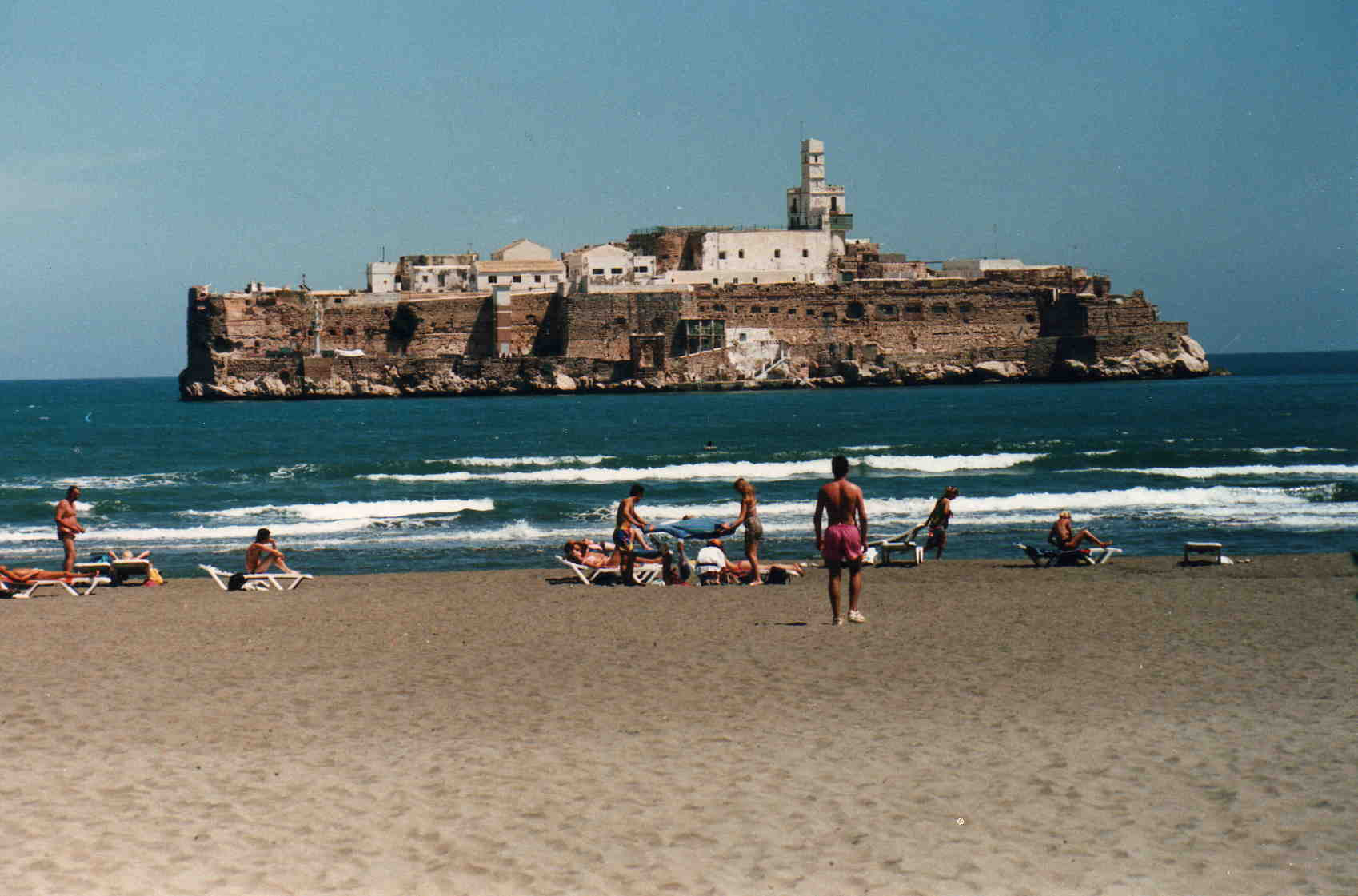 Vista del peñón desde la playa